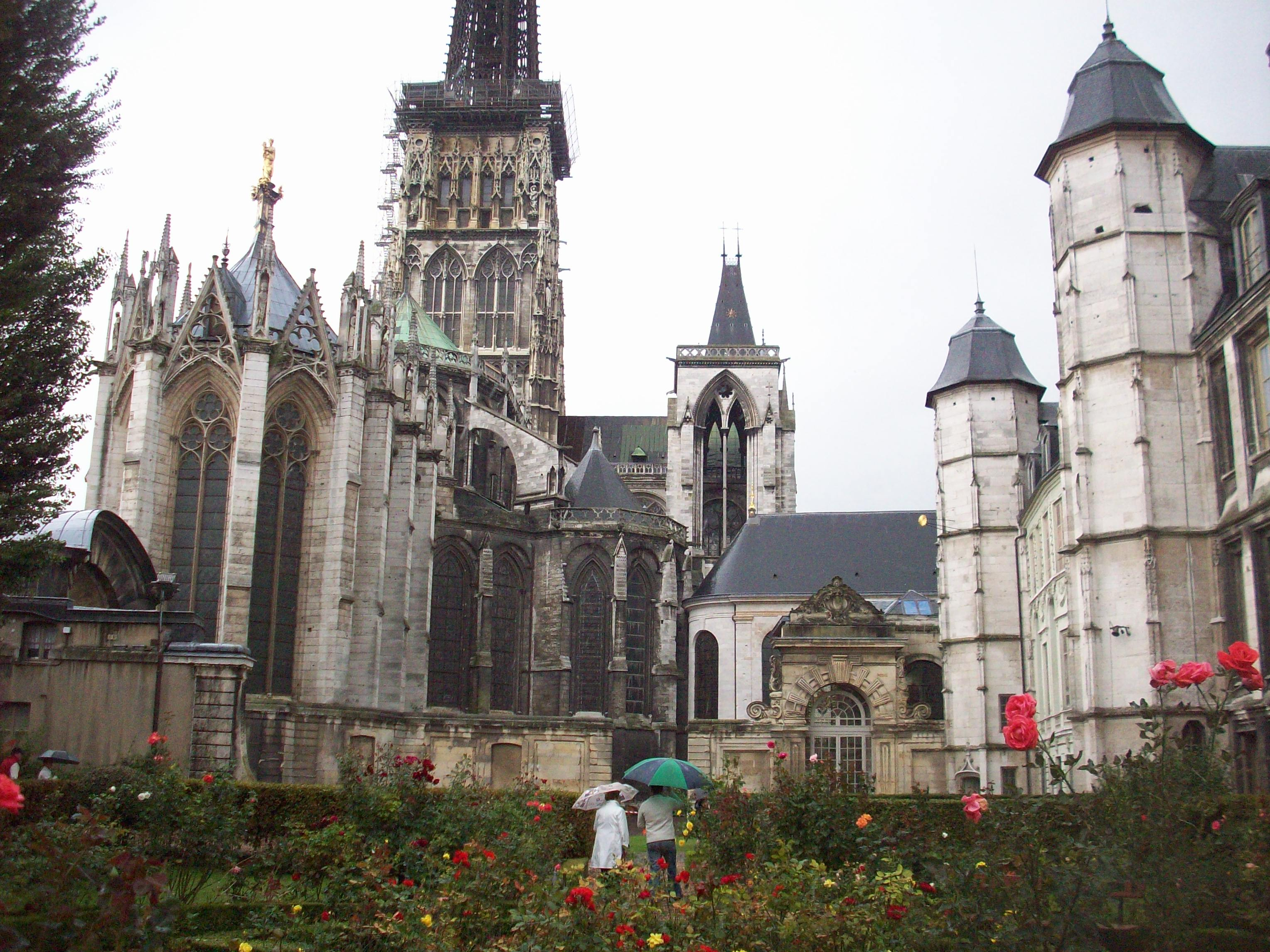 La cathédrale et l'archevêché depuis les jardins.